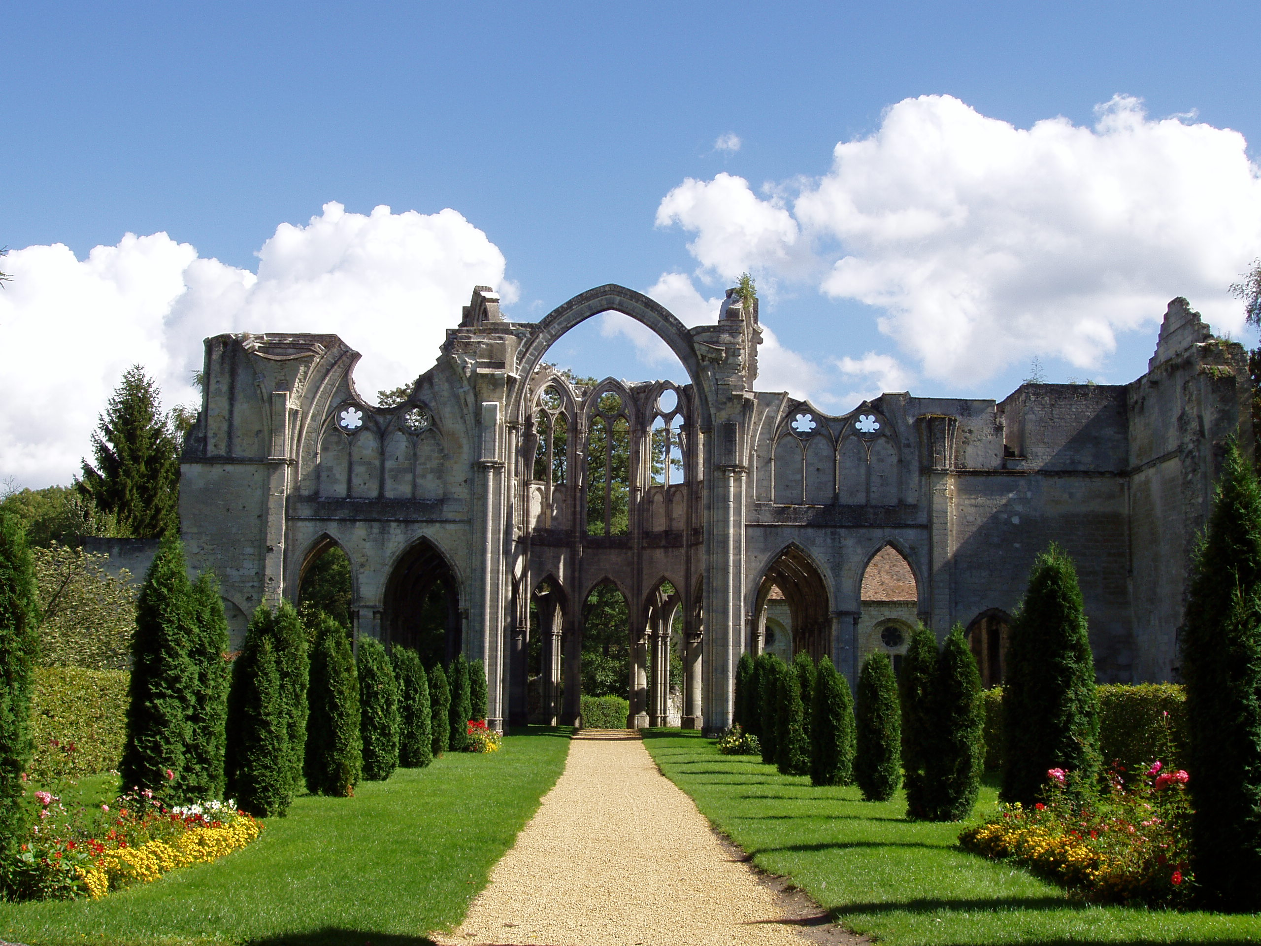 Abbaye d'Ourscamp (Oise)